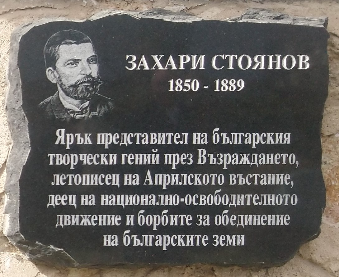 Захари Стоянов (1850 - 1889) - плоча в Исторически музей Панагюрище - Надпис: Ярък представител на българския творчески гений през Възраждането, летописец на Априлското въстание, деец на национално-освободителното движение и борбите за обединение на българските земи